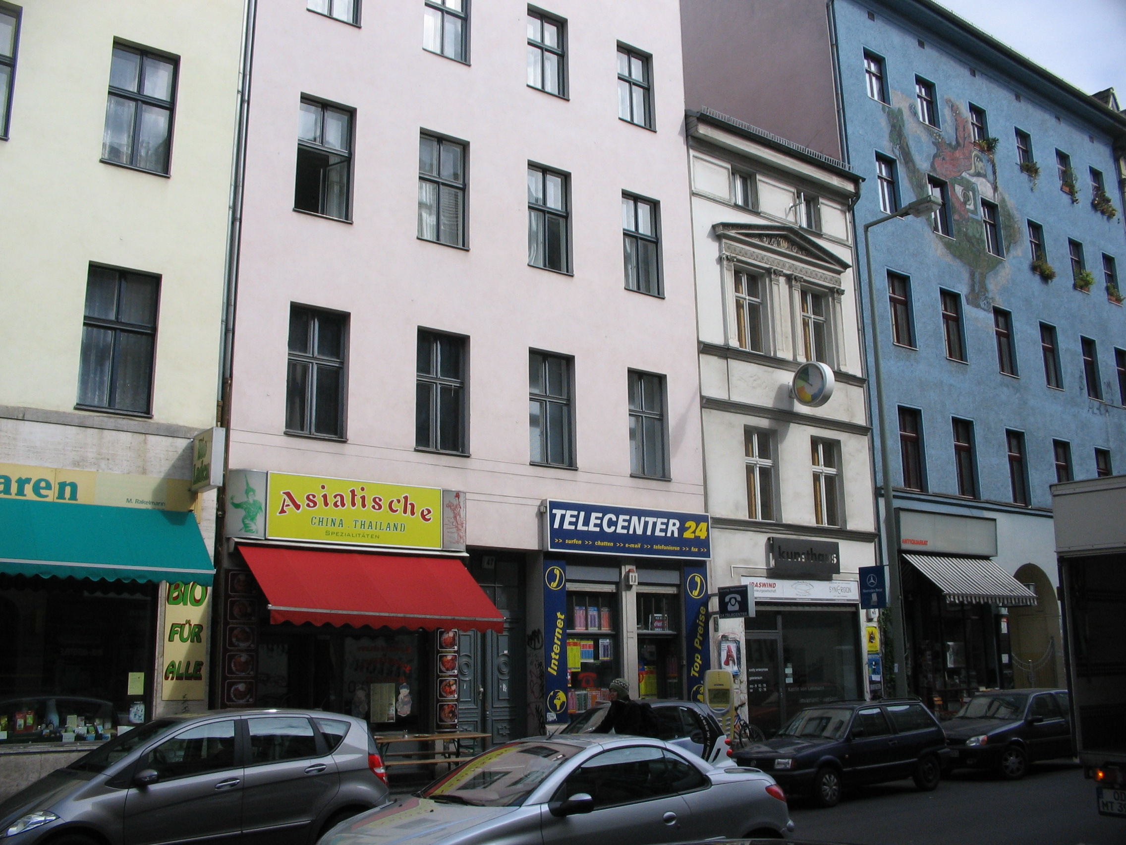 Das im Jahr 1864 auf einer Grundfläche von nur 48 qm erbaute kleinste Haus von Kreuzberg steht unter Denkmalschutz und hat sich am Tag des offenen Denkmals 2008 beteiligt.